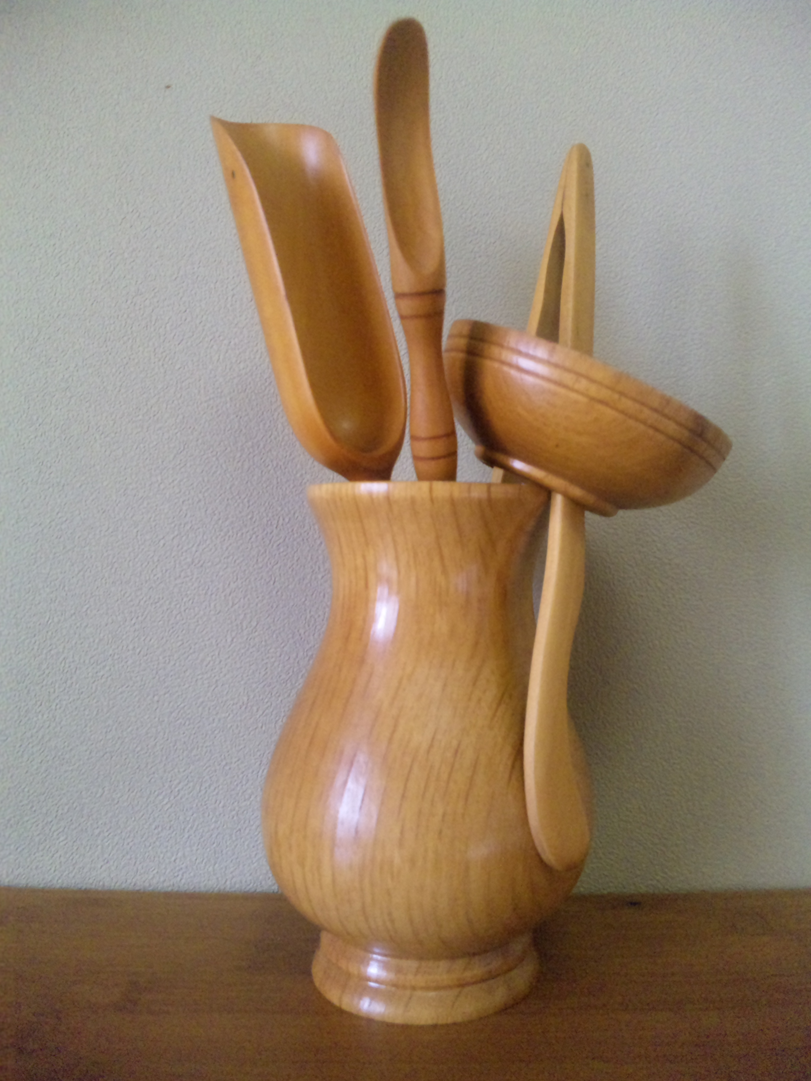 中国茶で用いられる茶具。かりんの木で作られている。